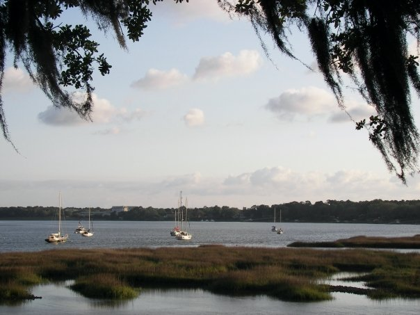 Beaufort harbor.